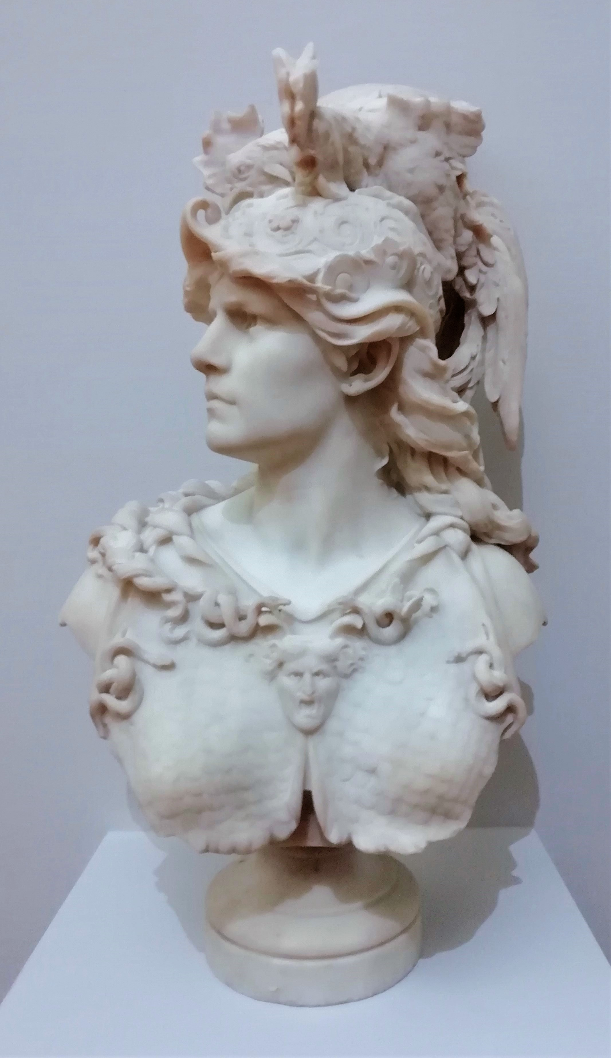 Henri Ding (Grenoble, 1844 - idem, 1898), Gratianopolis, 1884, marbre. Achat à Jules Biron en 1896. Salon de Grenoble (plâtre, 1883). Cette sculpture est une allégorie de la ville de Grenoble, jadis appelée Gratianopolis. Une jeune femme au regard profond et aux allures conquérantes, est entourée par multiples attributs symboliques. Sur le casque ailé trône un coq bicéphale, avec les armoires de la ville (d'or aux trois roses de gueules). Les pans du vêtement sont couverts d'écailles (un motif de gorgone selon certains), et des serpents décorent l'encolure. Informations tirées de la plaquette de l'Exposition temporaire "Grenoble et ses artistes au XIXe siècle" au Musée de Grenoble.